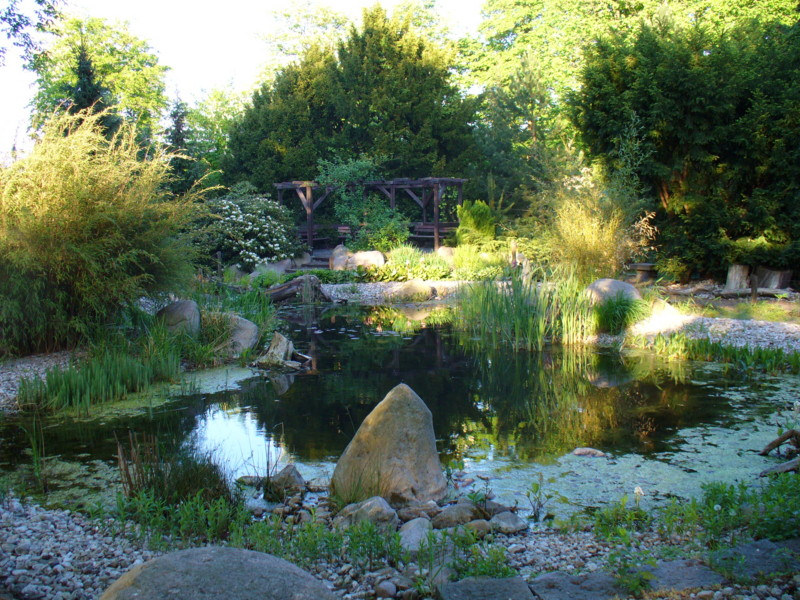 Nordfriedhof Leipzig, Biotop